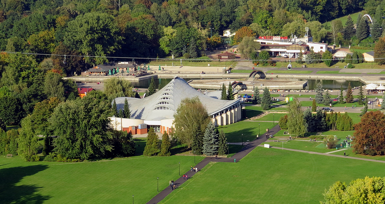 Hala wystawowa Kapelusz w Parku Śląskim (dawny WPKiW) w Chorzowie.